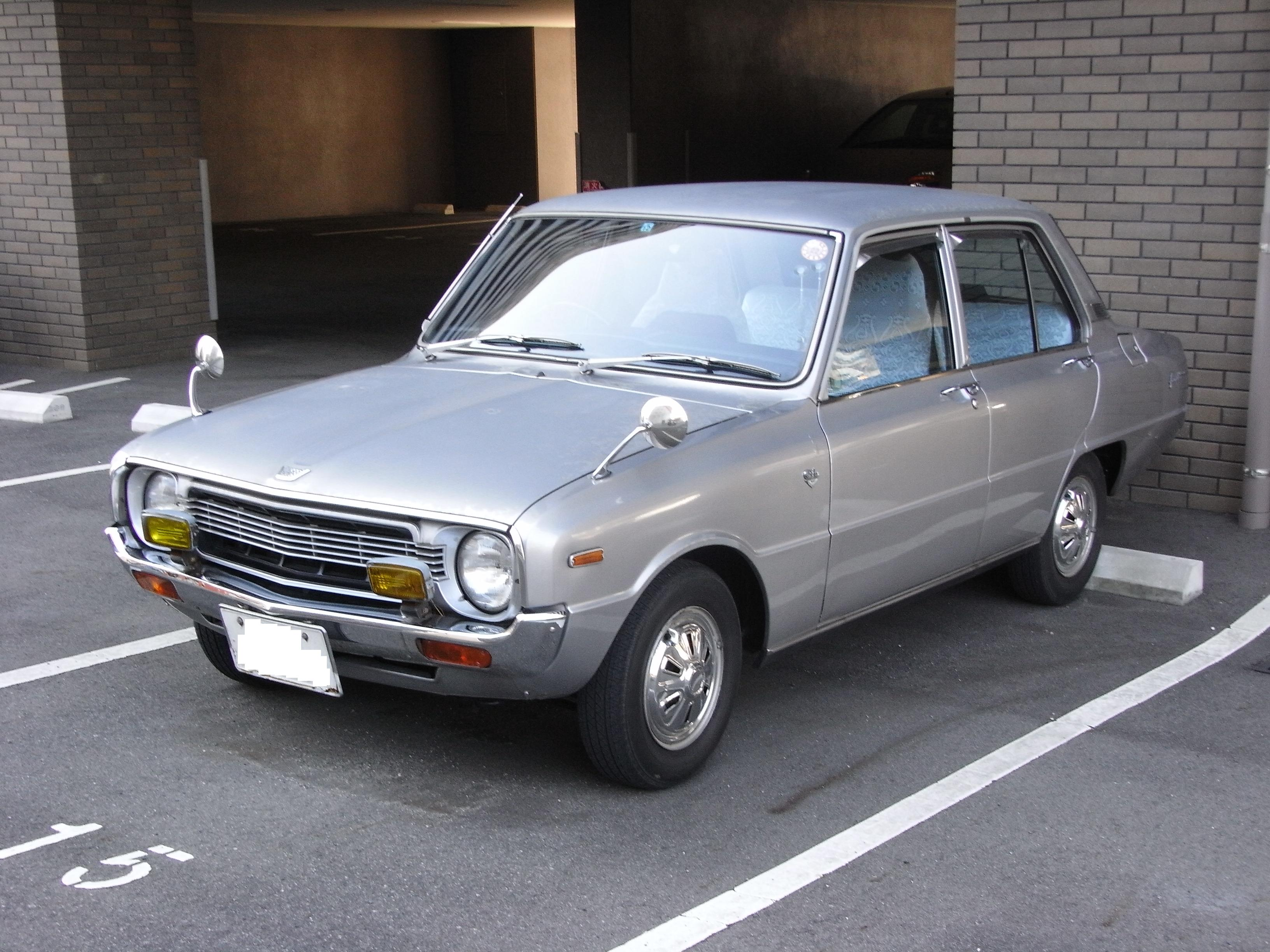 Mazda FAMILIA(マツダ・ファミリア)